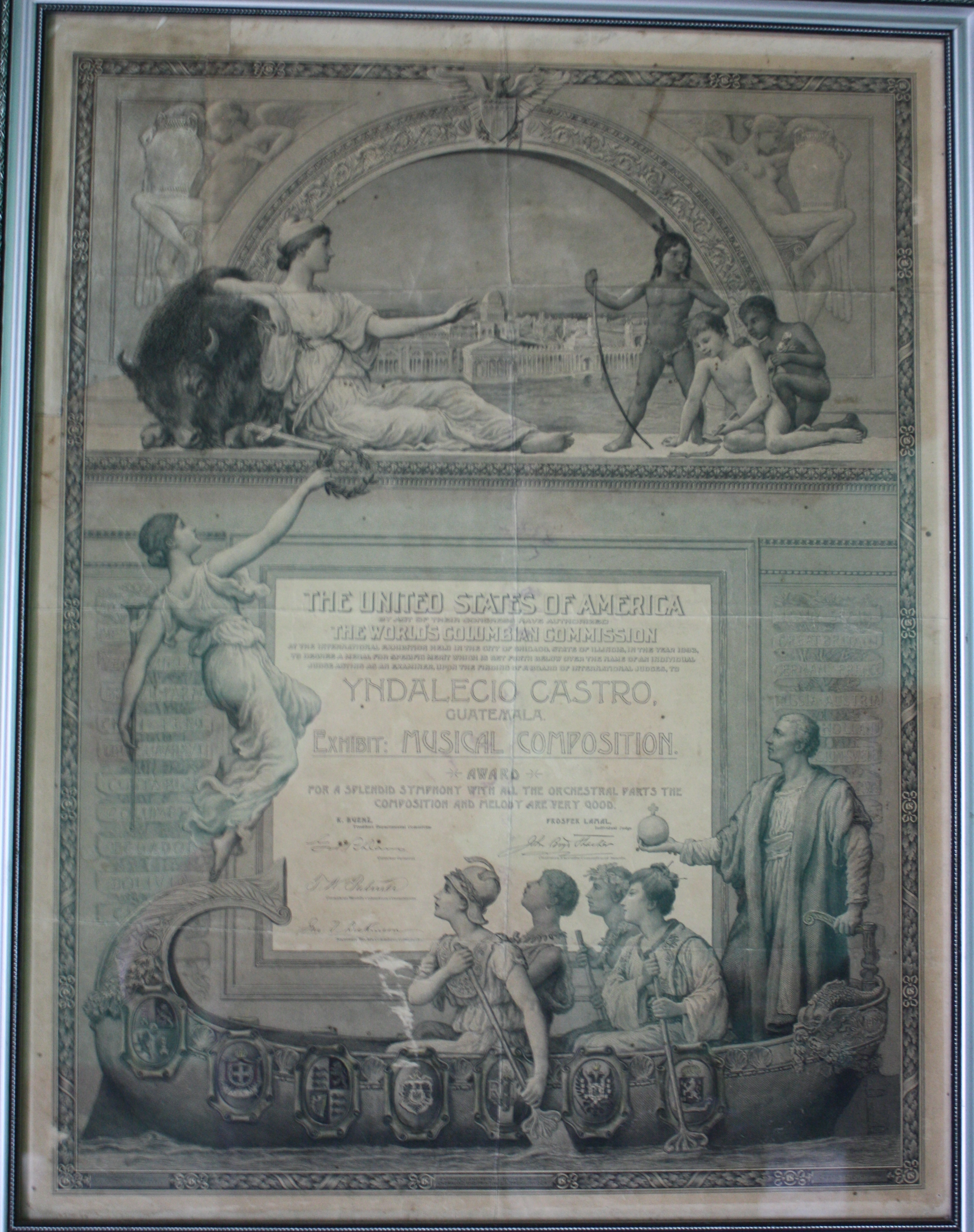 Este es el diploma que recibió Indalecio Castro como premio a su creación sinfónica, en la Exposición Universal de Chicago, en 1893.